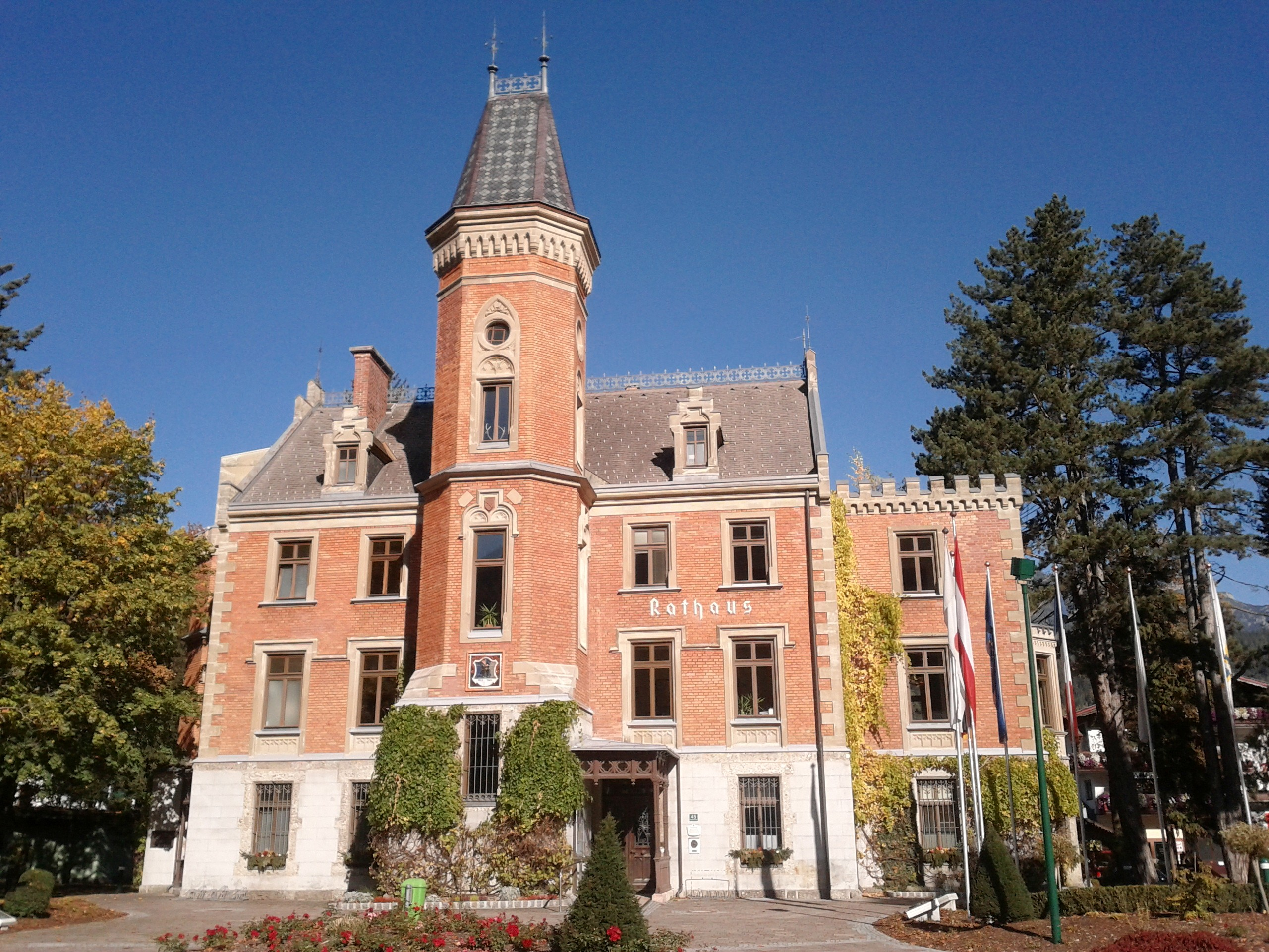 Rathaus, ehem. Palais Coburg